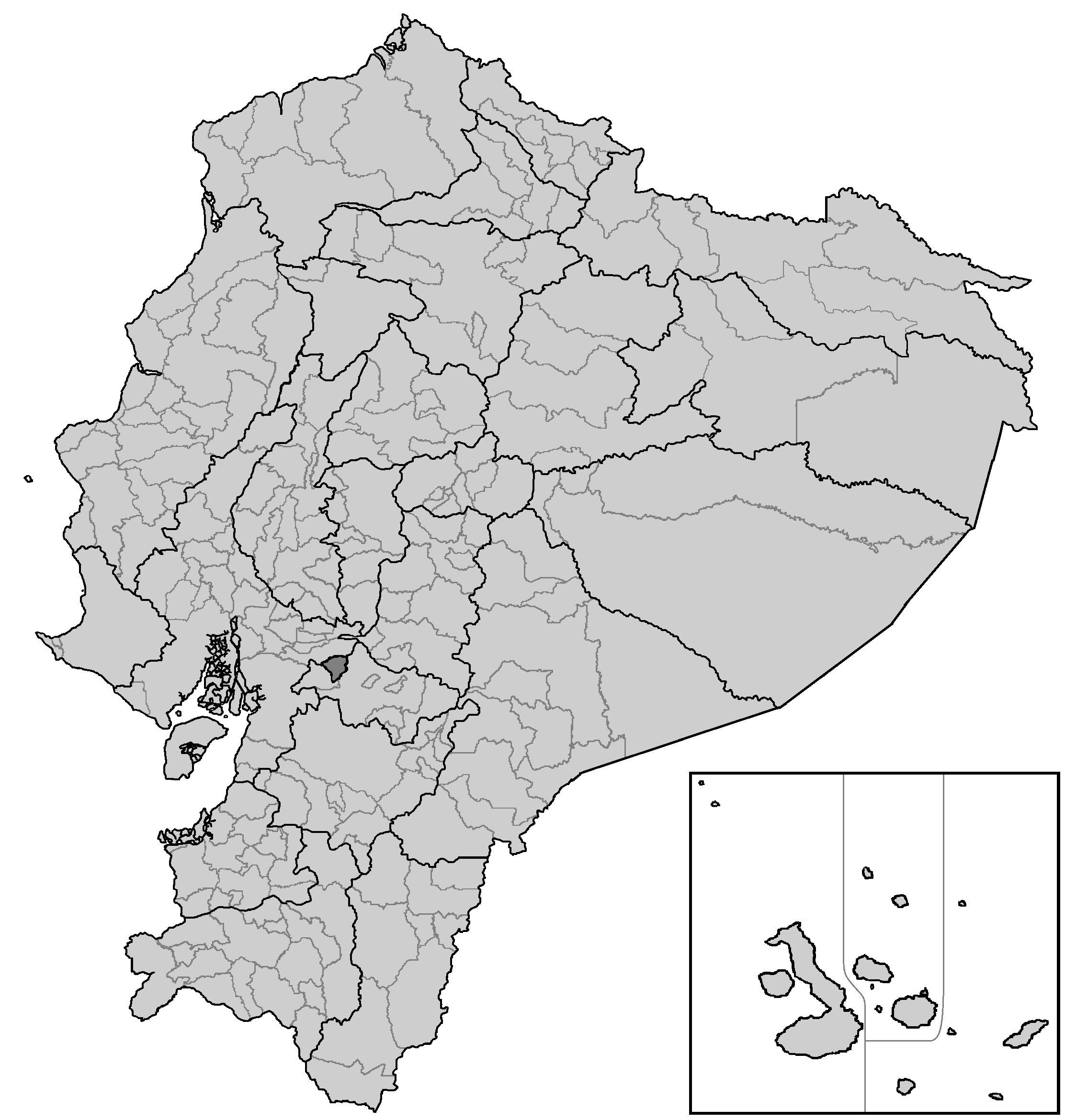 Mapa de los cantones del Ecuador